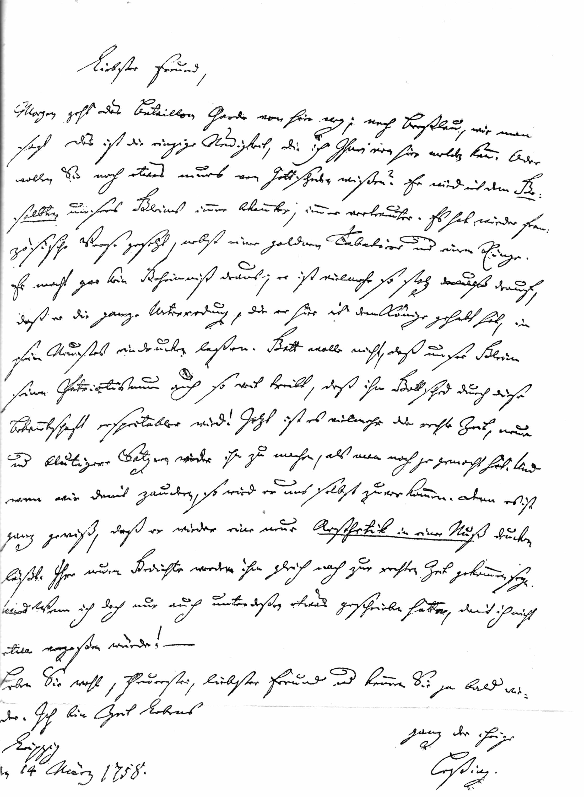 Letter from Gotthold Ephraim Lessing to Ewald Christian von Kleist, 14. March 1758